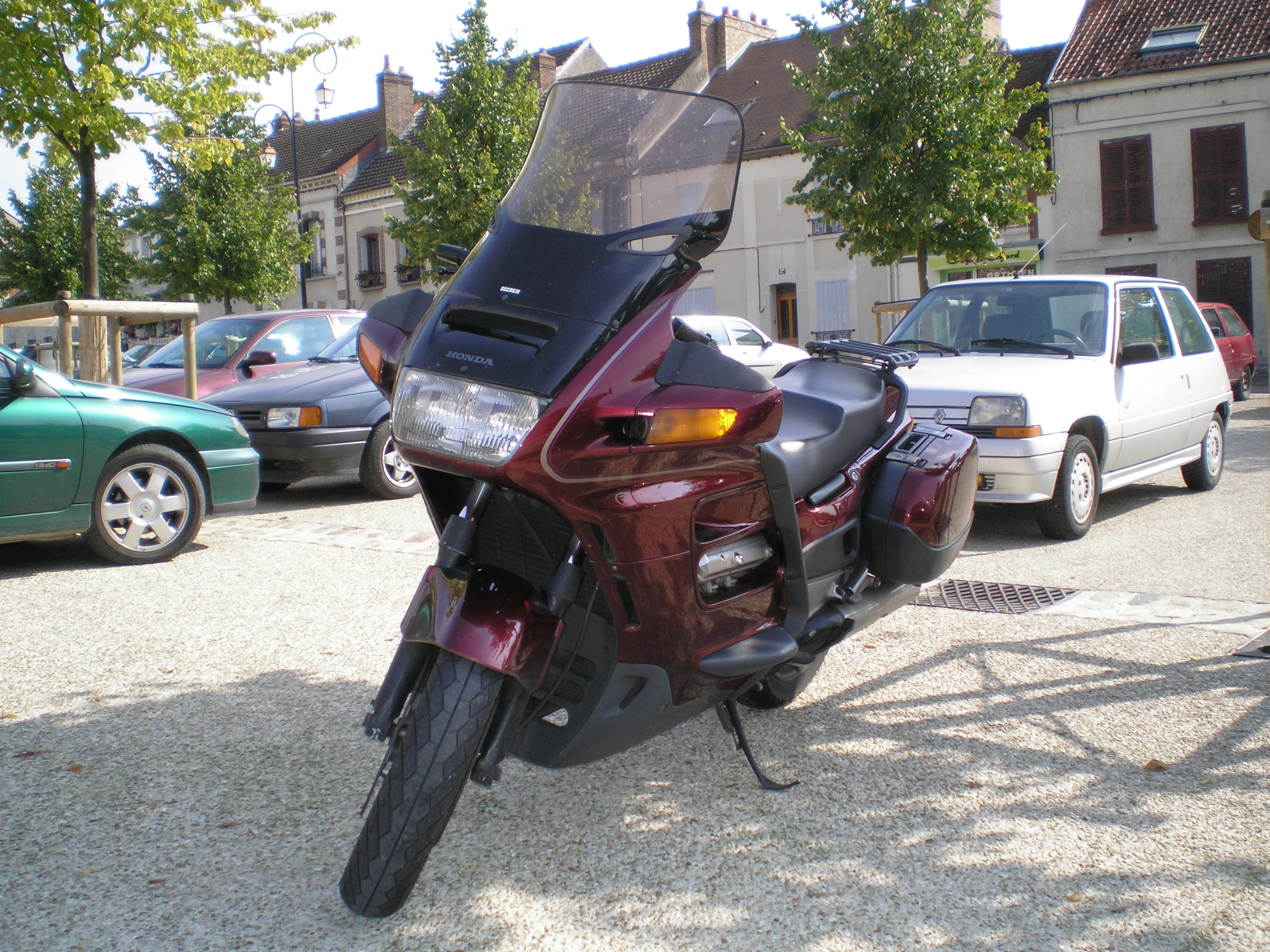 Honda 1100 ST Pan-European Auteur : Dédélembrouille